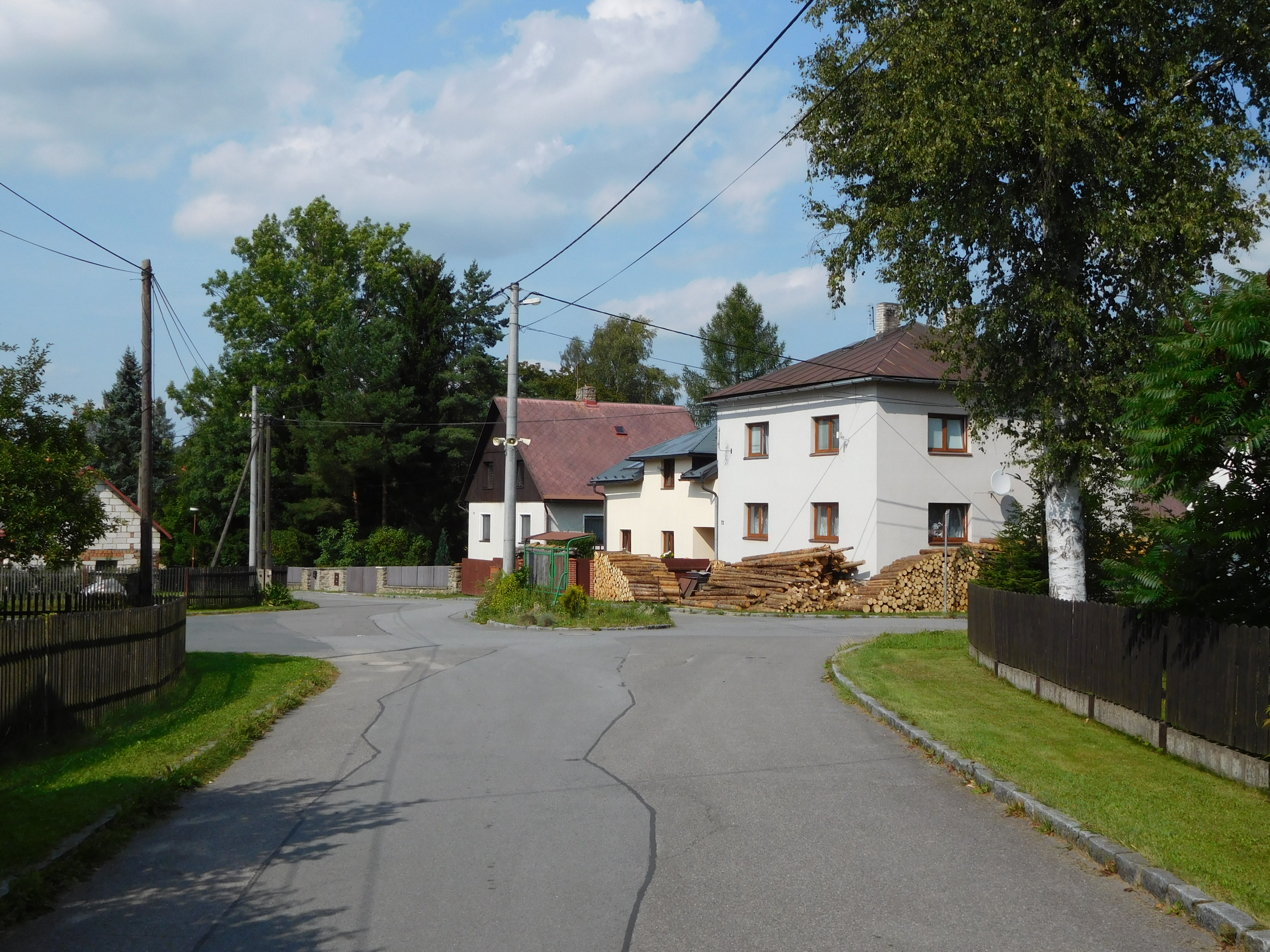 Moravská Svratka - střed, č.p. 71 a 73